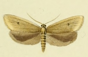 Avaria hyerana